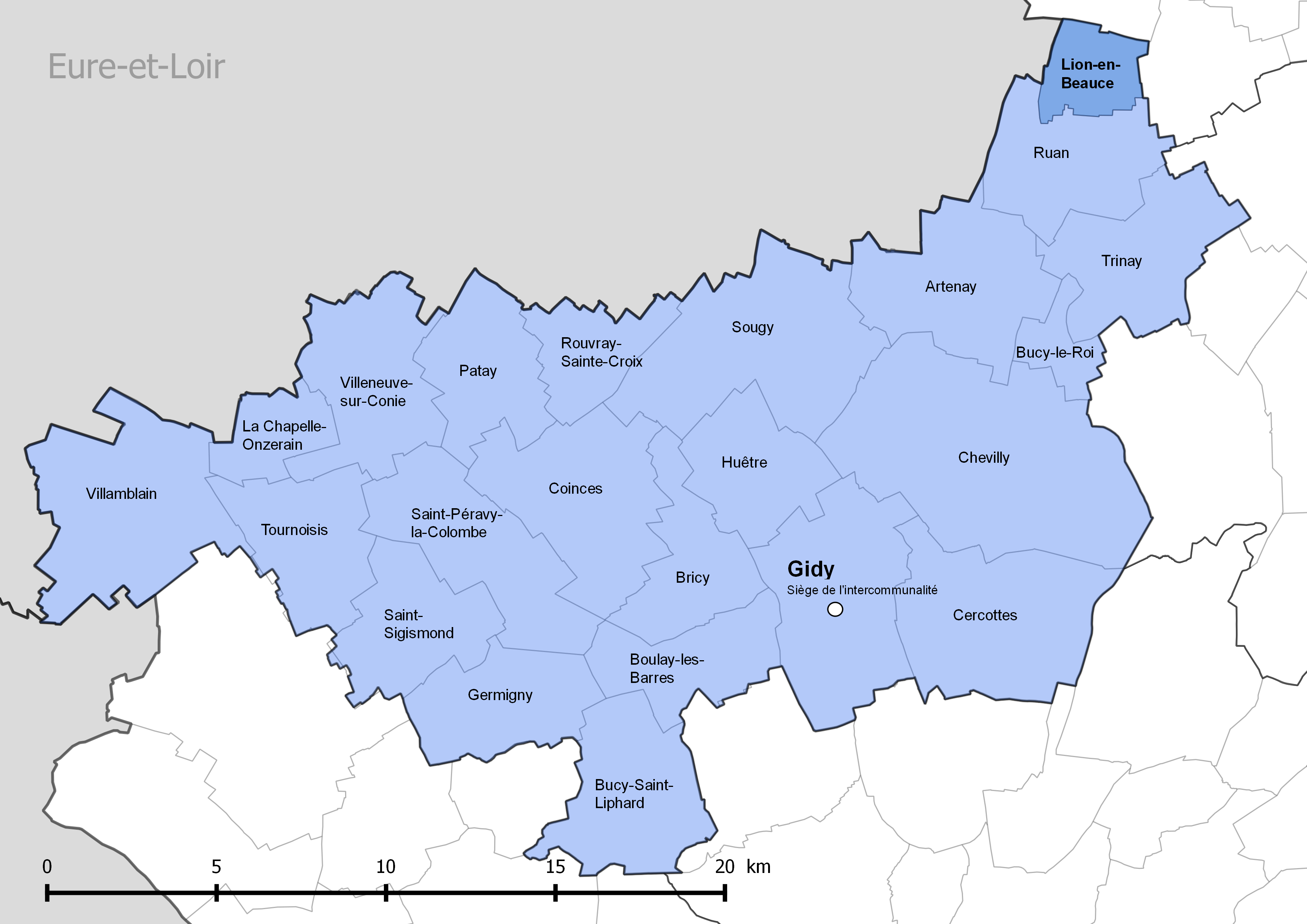 Périmètre de la communauté de communes de la Beauce loirétaine - Situation de la commune de Lion-en-Beauce